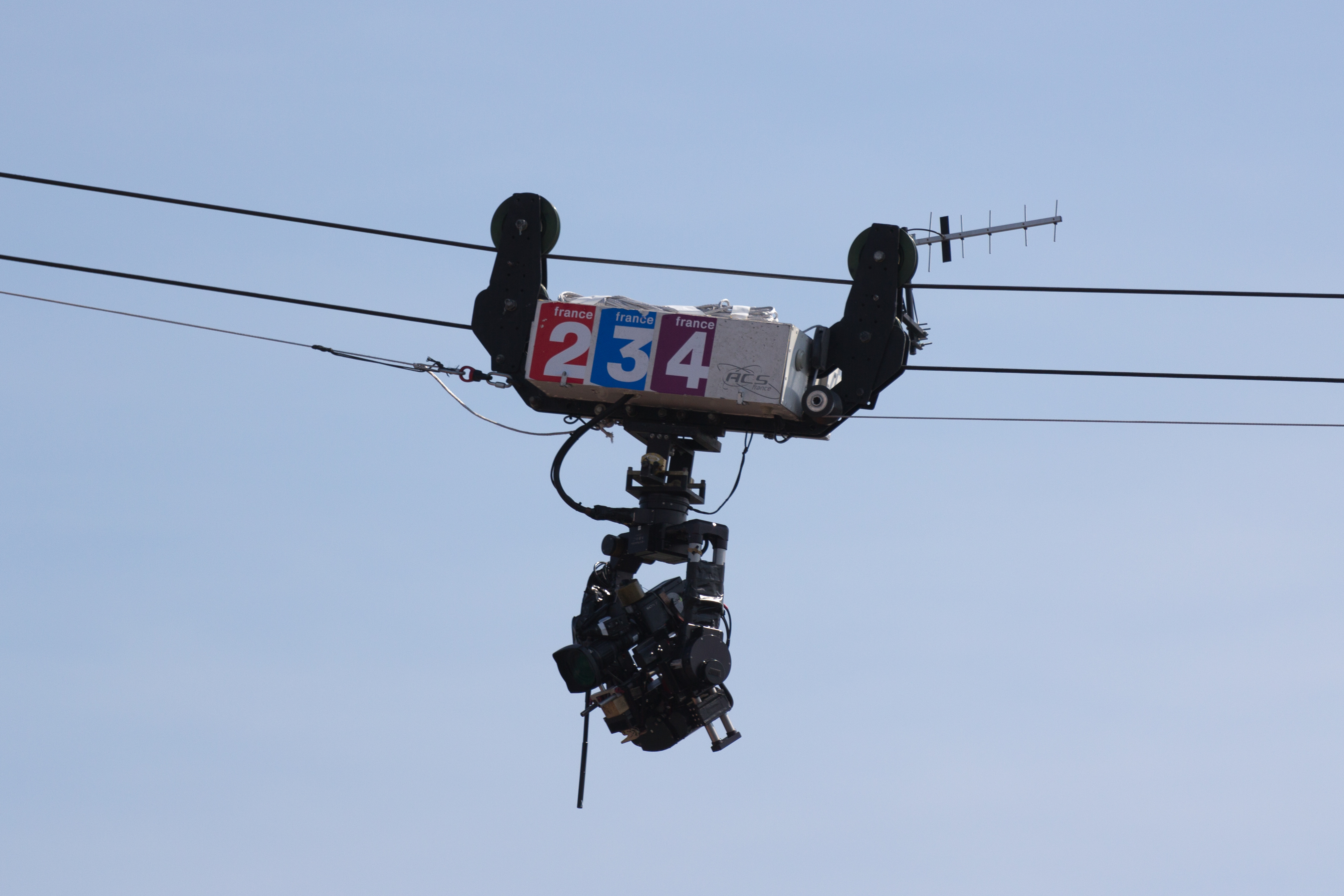 Caméra CableCam d'ACS France en mai 2012 au dessus du Court Philippe Chatrier du stade de Roland Garros, Paris, France